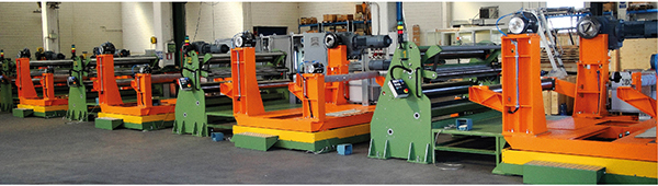 Новая кландерная линия на заводе "Курскрезинотехника"